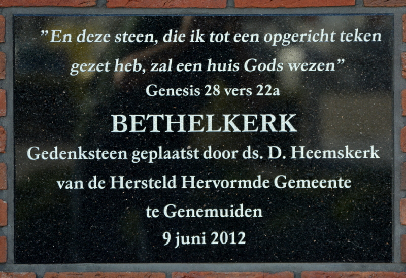 Bethelkerk, Genemuiden (gevelsteen)